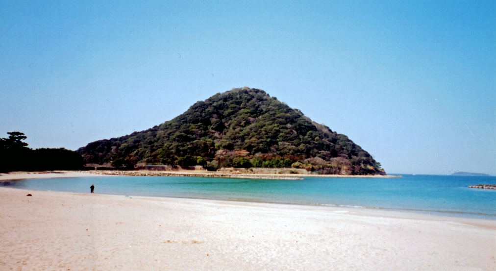 山口県萩市、菊が浜と指月山。